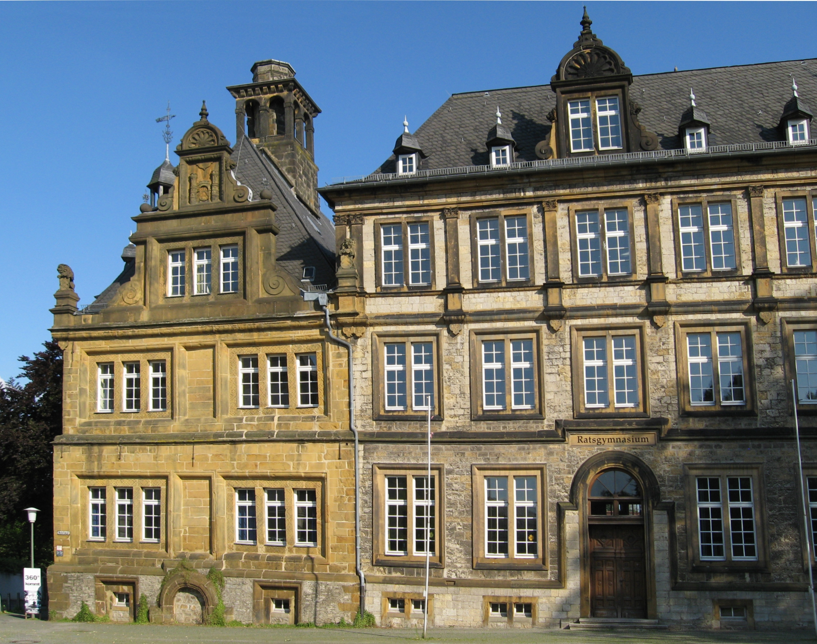 Ratsgymnasium Bielefeld, links der Grestehof